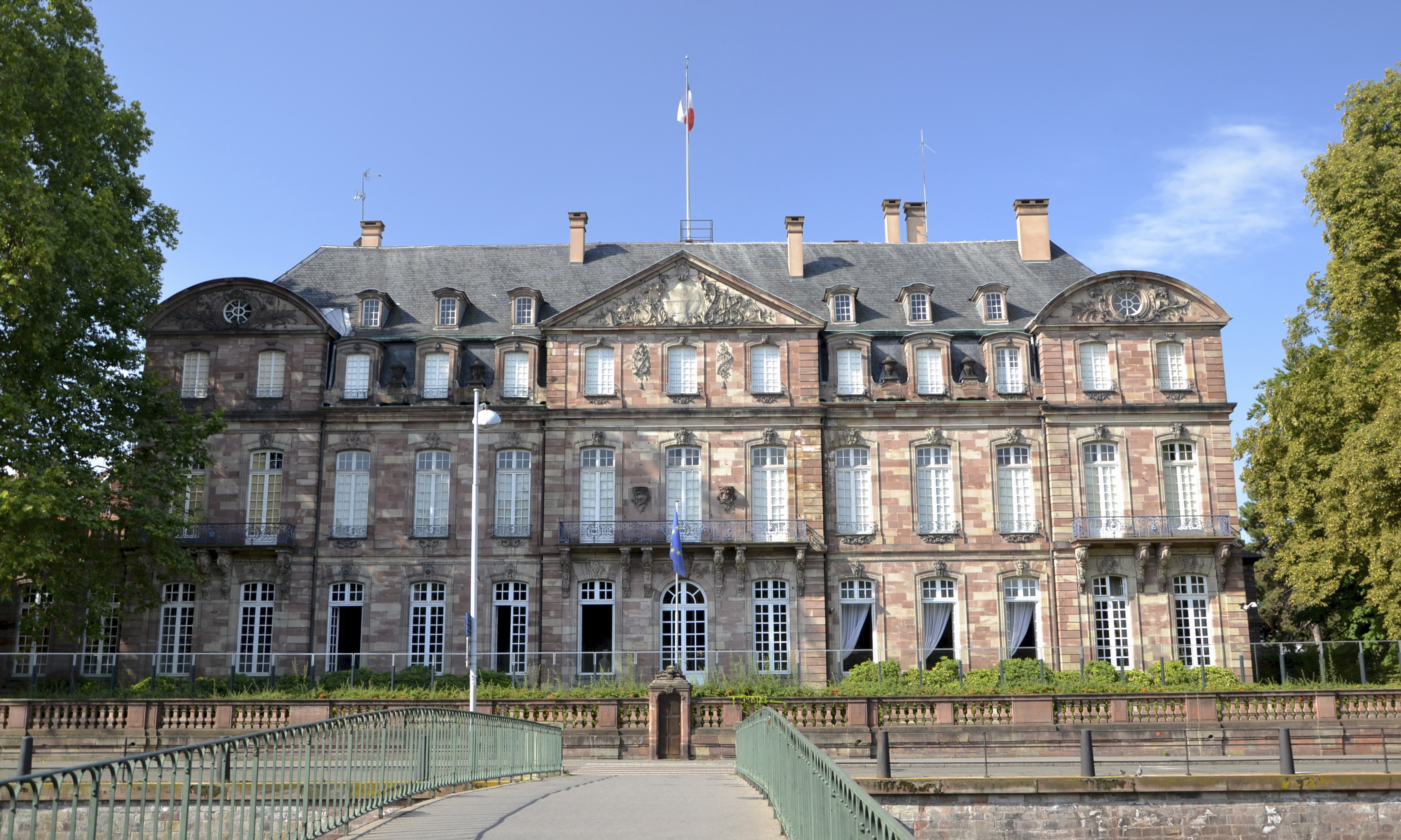 Caractéristiques Ville : Strasbourg (67000) Quartier : Ellipse insulaire Adresse: 2, place du Petit Broglie Livraison : 1736 Fonction : Administration Architecte : Jean Pierre Pflug Données techniques Niveaux : R+3 Hauteur : ±17.00 m